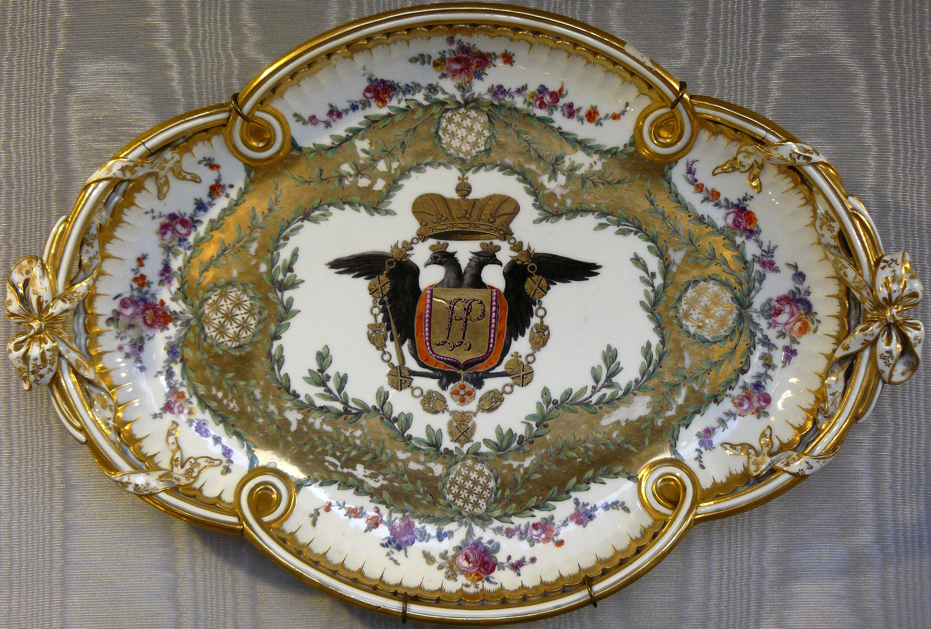 Plat en porcelaine dure de Sèvres, d'un cabaret de 8 pièces, décors polychrome et or au chiffre de Paul Petrovitch, 1773 - Musée national de céramique, Sèvres (Hauts-de-Seine, France) - Inv n° MNC 5273